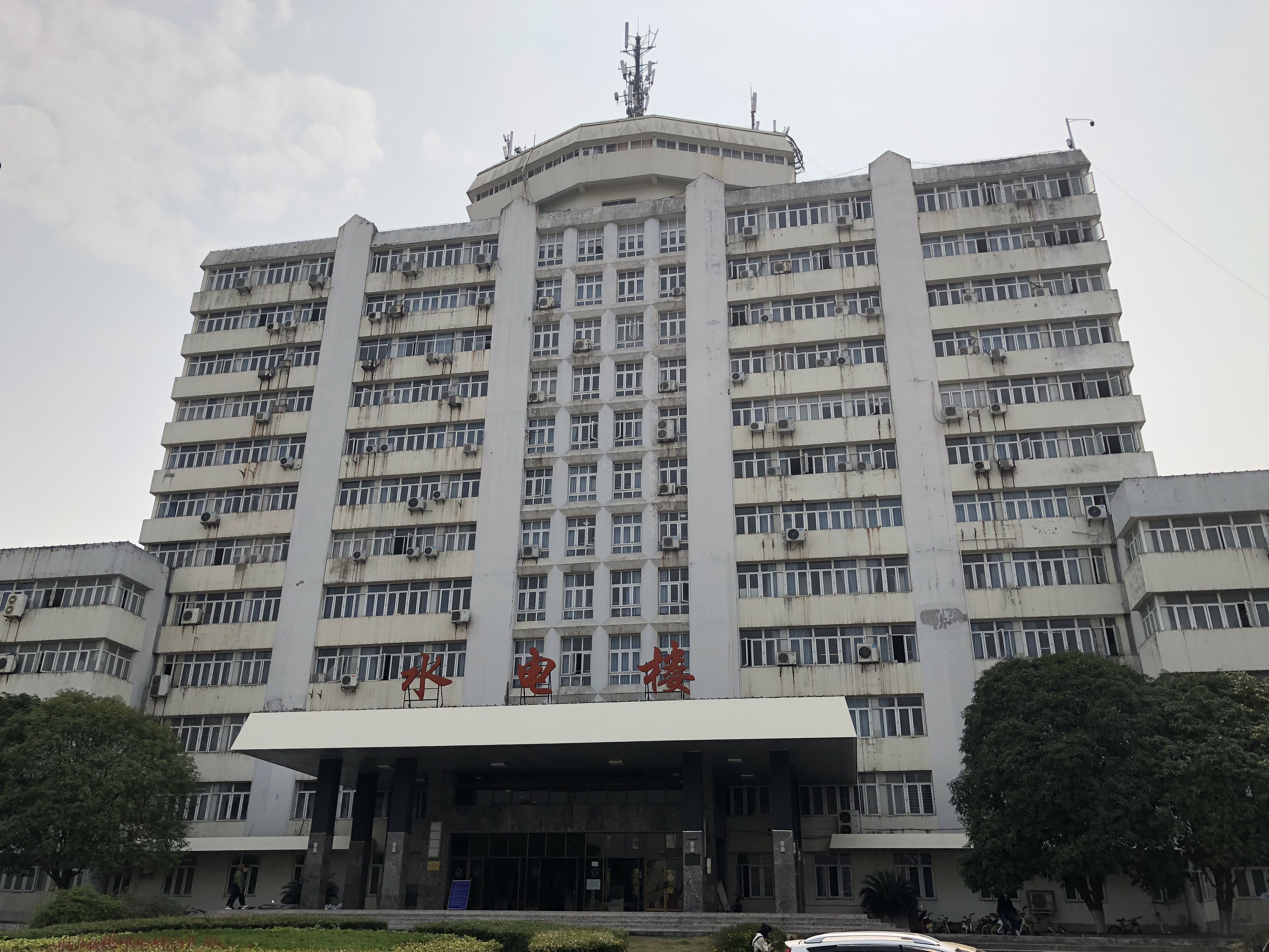 三峡大学水电楼